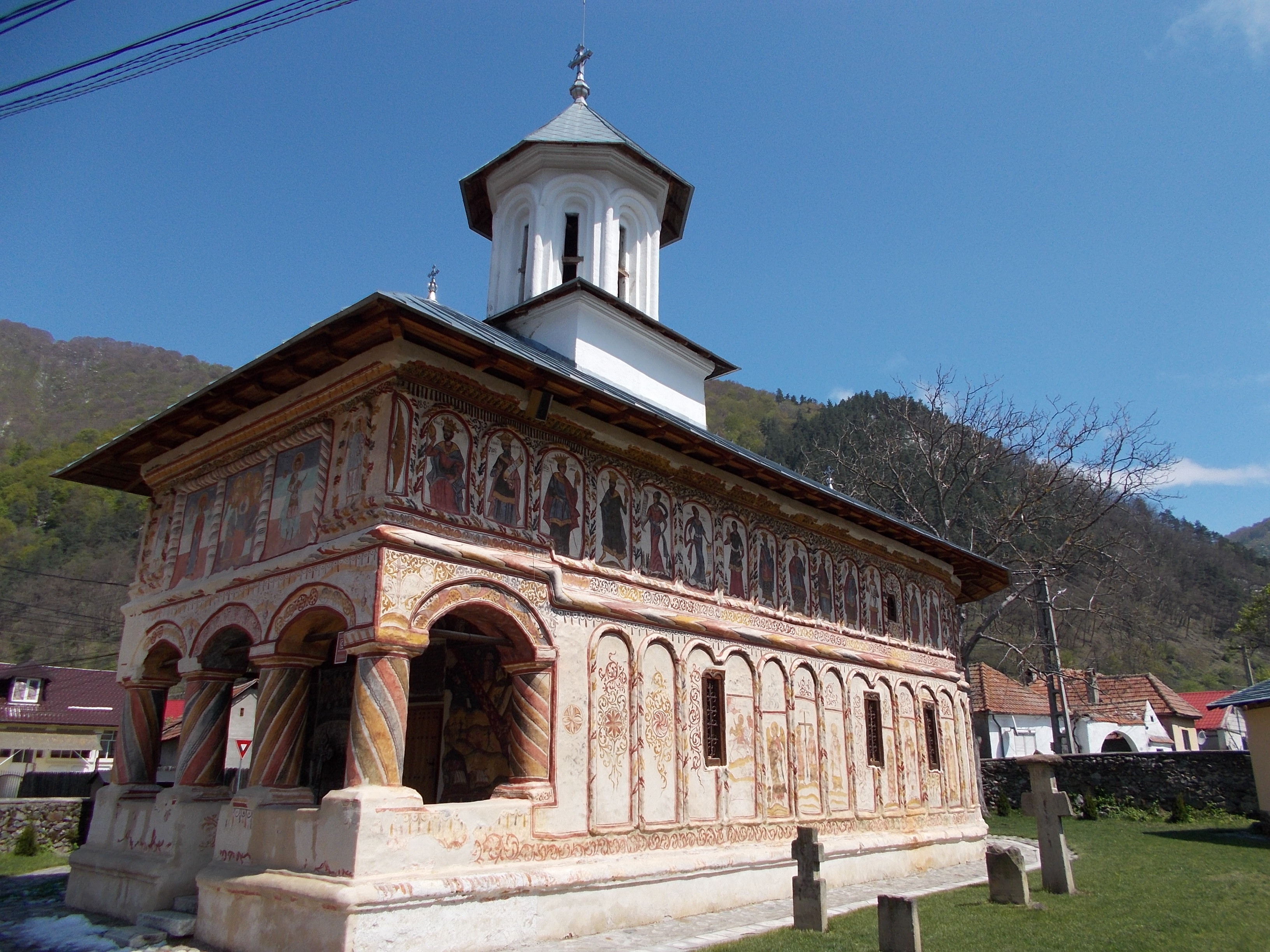 Biserica ”Sfinții Voievozi” din satul Câinenii Mici, județul Vâlcea